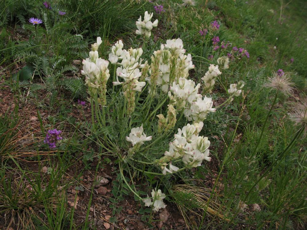 Копеечник Турчанинова(Hedysarum turczaninowii).Каменистая степь в окрестностях г. Красноярска.